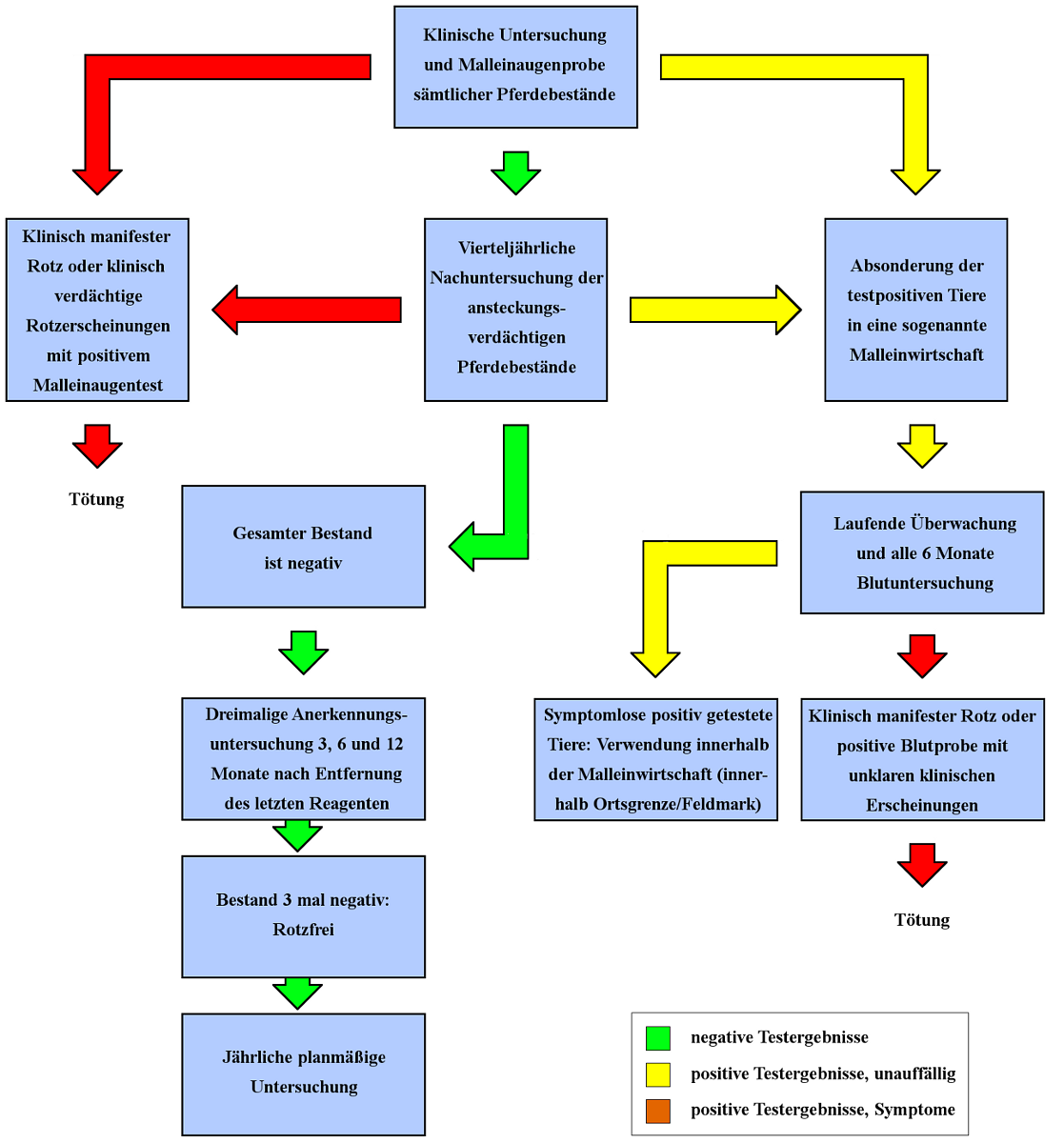 Schema Historische Untersuchungsprozedur zur Eradikation des Rotzes in der UDSSR